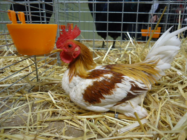 Coq combattant